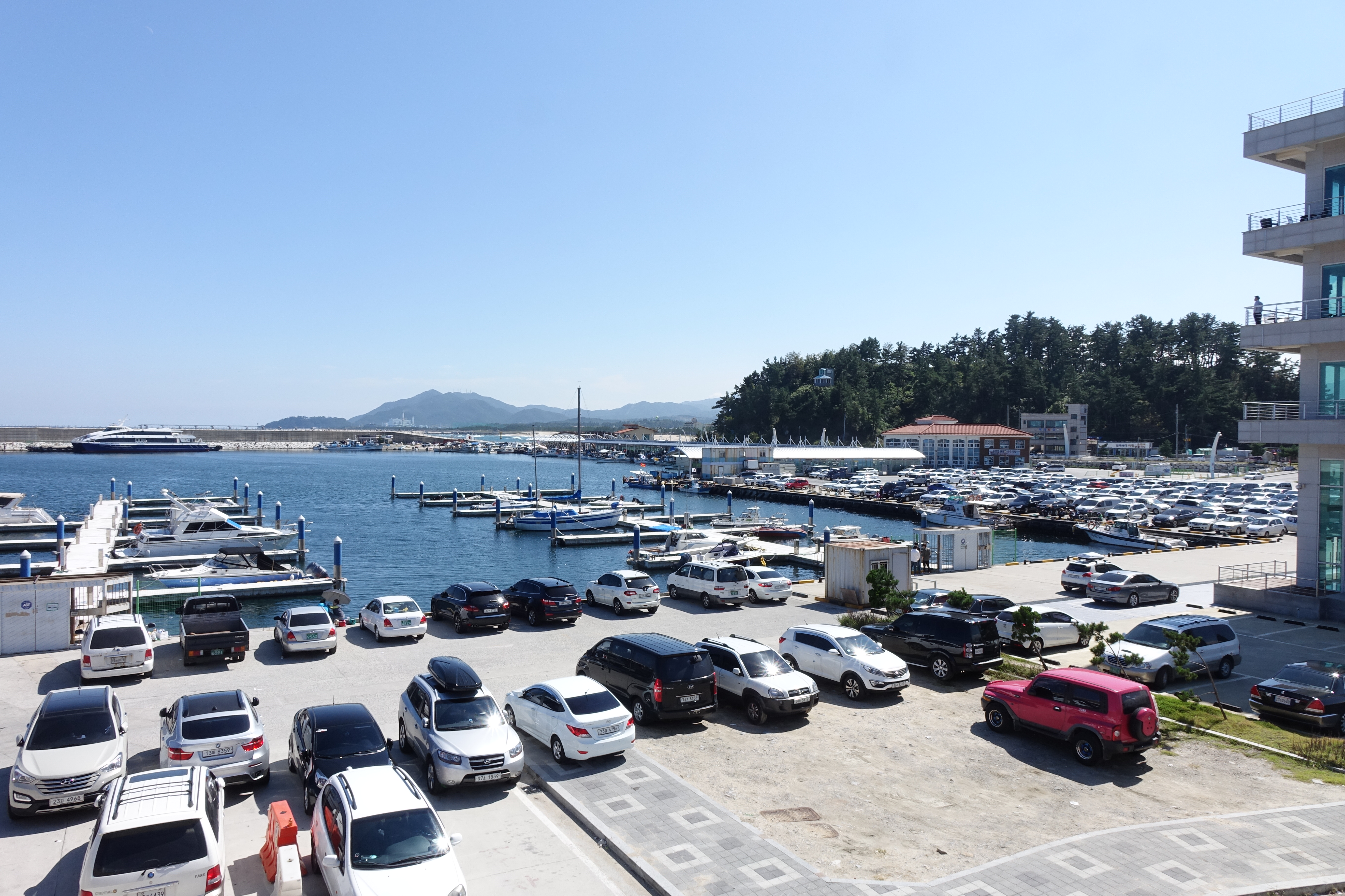 강릉항